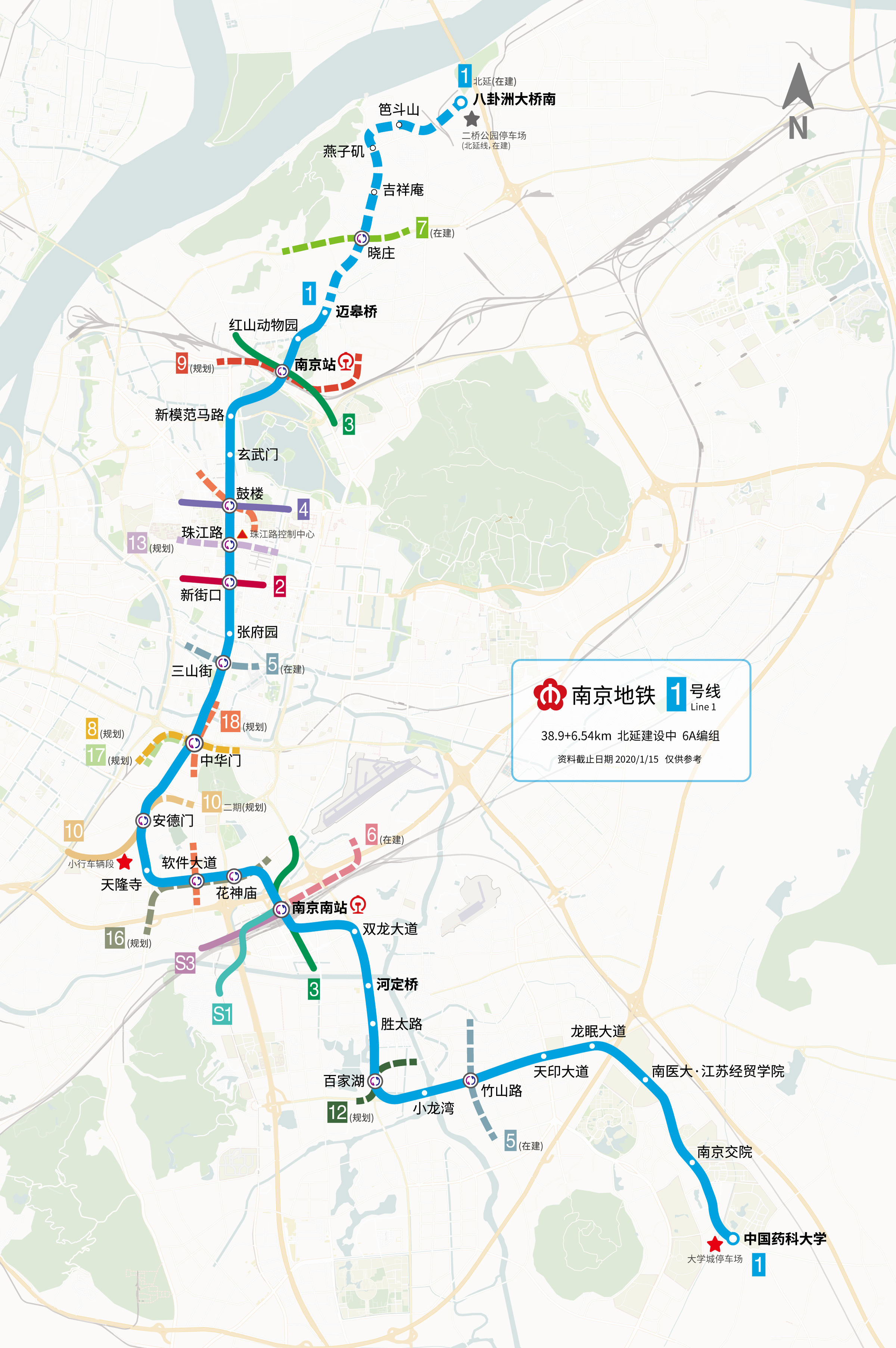 南京地铁1号线线路图(含北延线)，资料有效性截止时间2020年1月